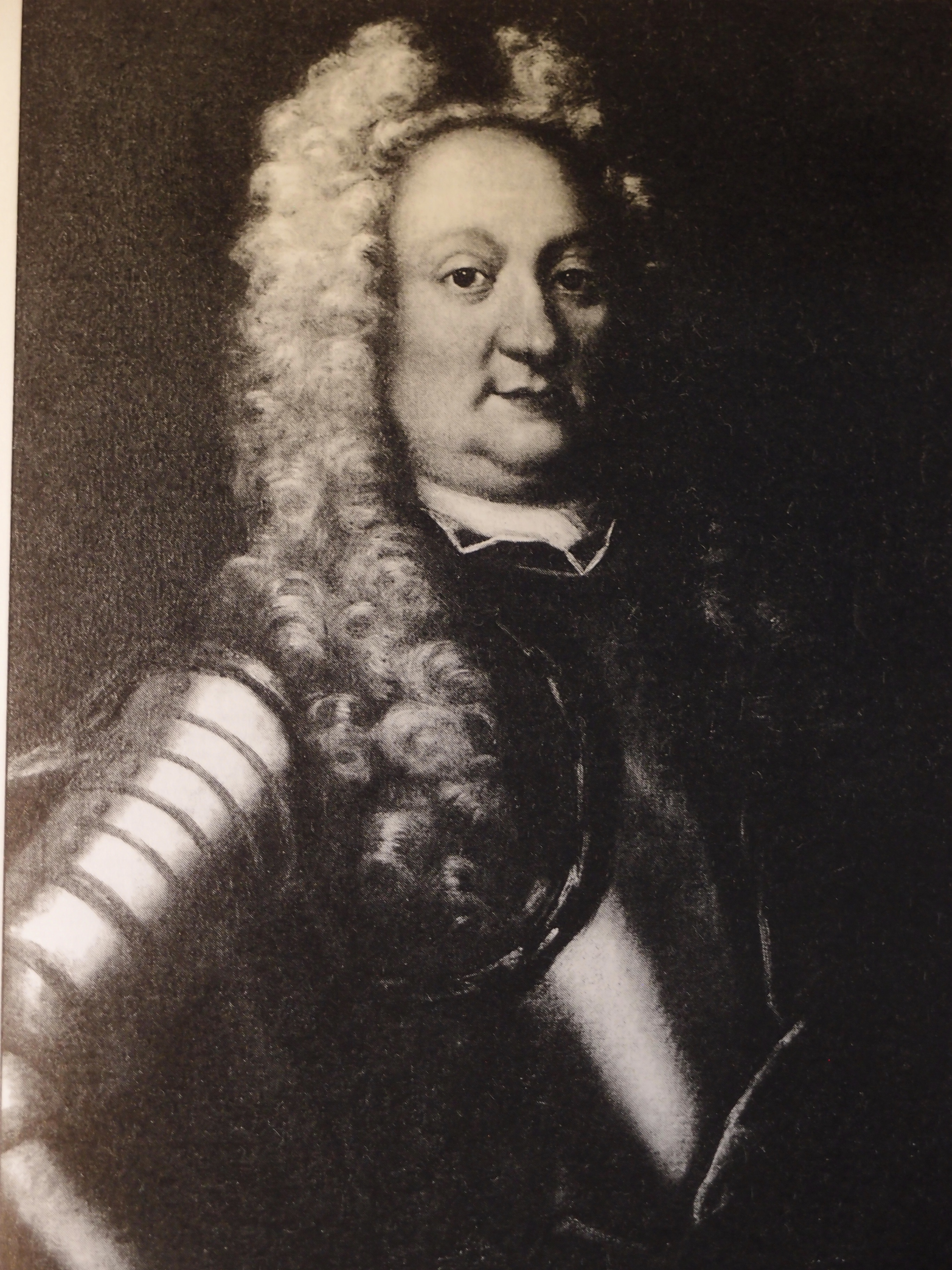 Johann Hermann von Campenhausen (1641 - 1705), geadelt seit 1675, Oberst, Vicekommandant der Zitadelle in Riga (1696), Vater des russ. Generalleutnants Balthasar Freiherr von Campenhausen